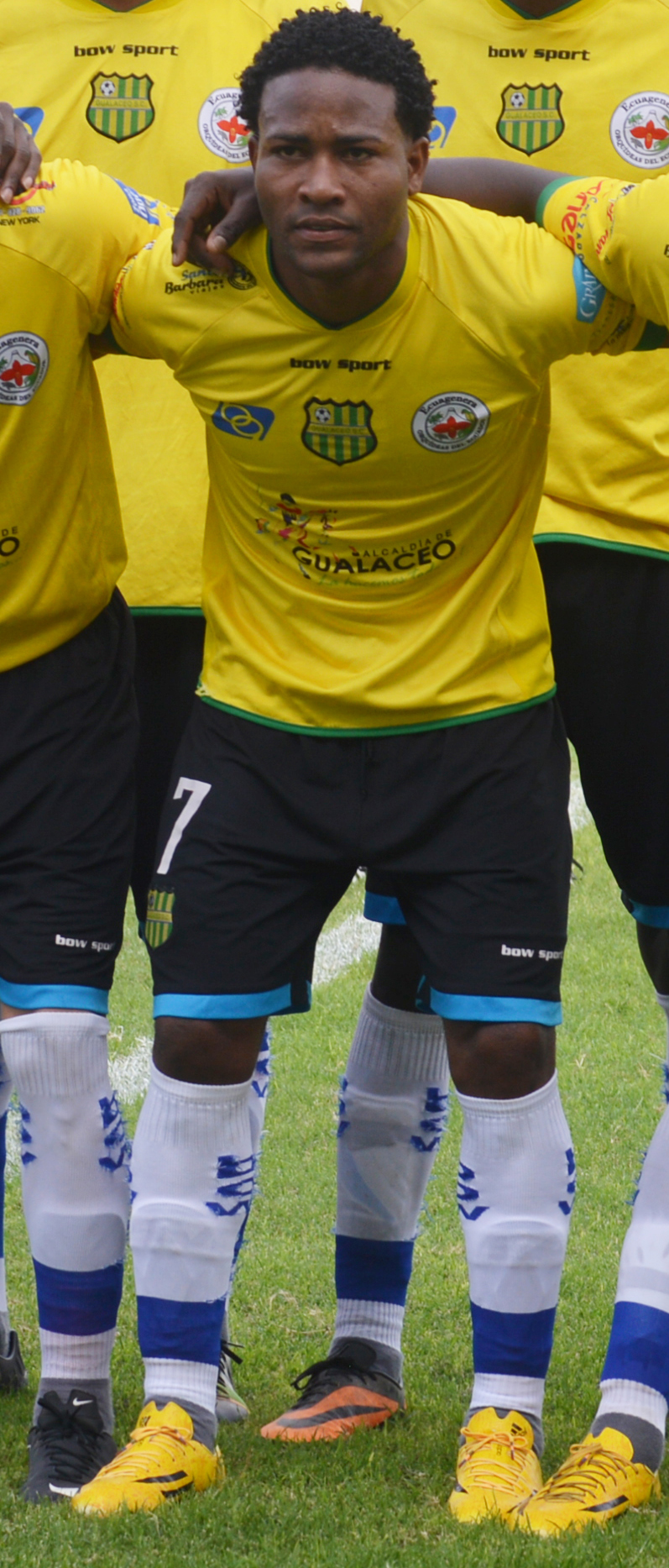 Wagner Valencia en Gualaceo en 2015